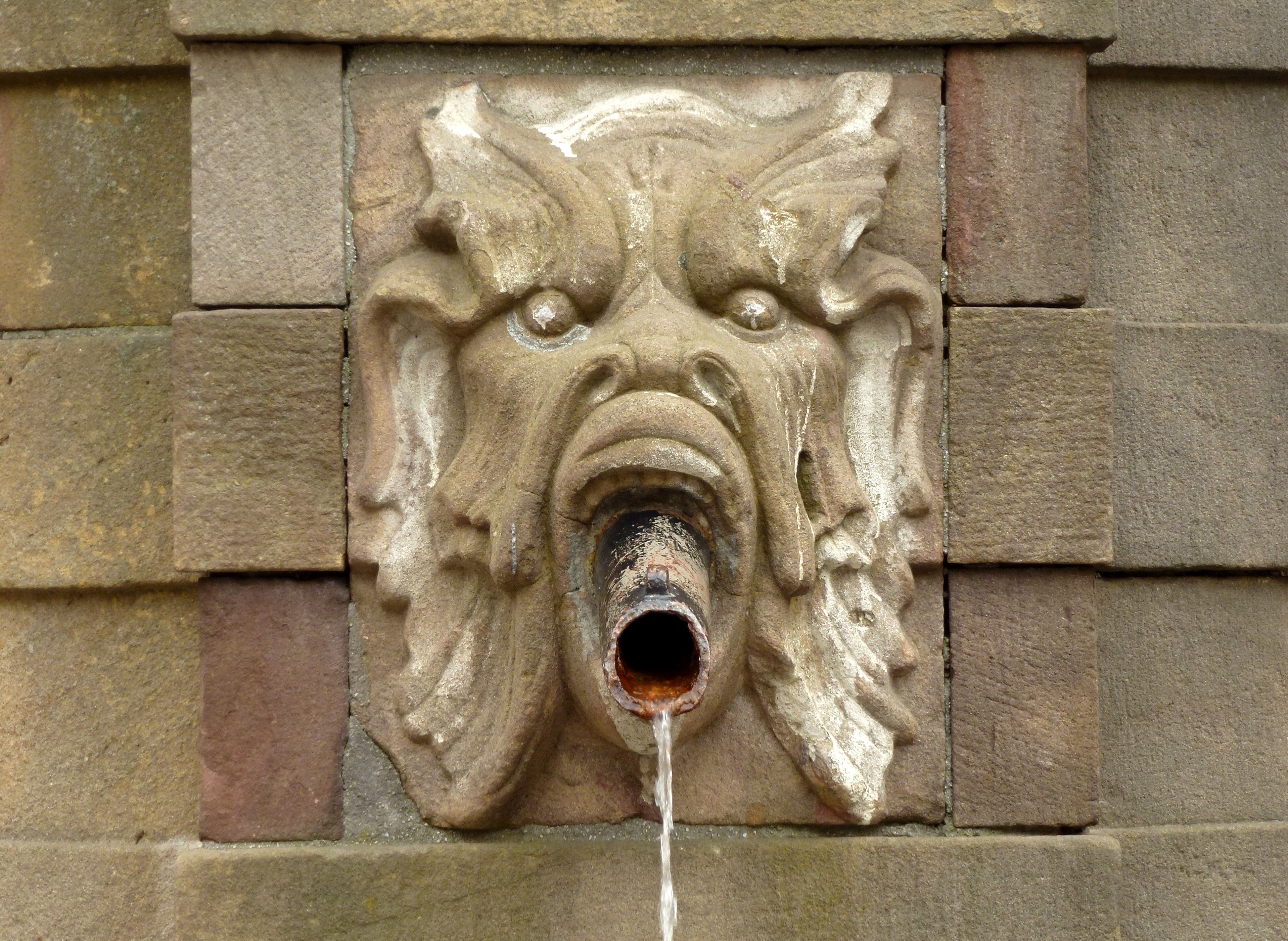 Stortorgsbrunnen lejonhuvud